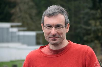 Foto di Dennis Gaitsgory